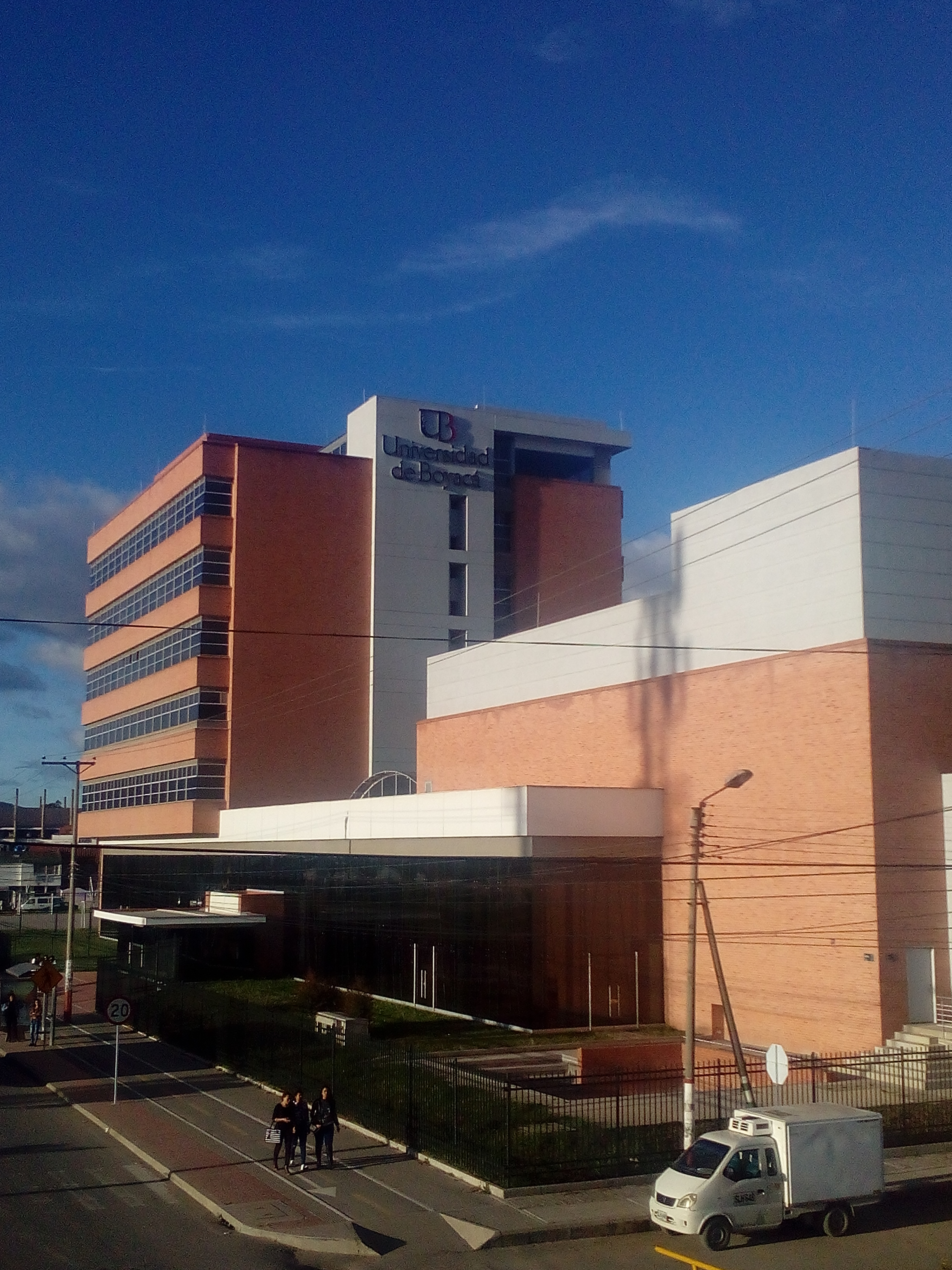 Vista desde el puente de la Calle 26